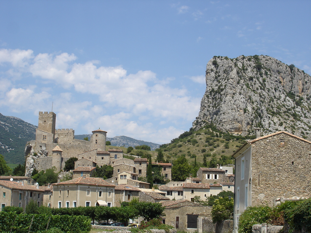 Saint-Jean-de-Buèges (34, Hérault, France).